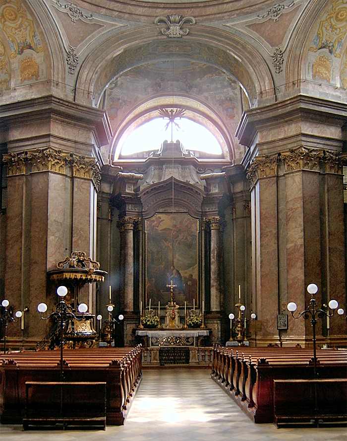 Salesianerinnenkriche, Wien (Innenraum)